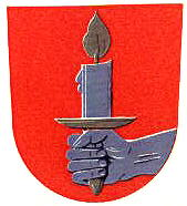 Karunan vaakuna